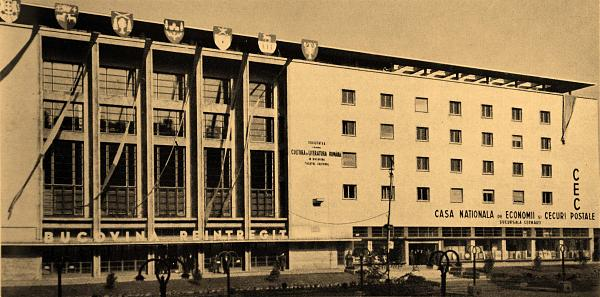 Румунський_Народний_Дім-.jpg: зображенням нового Румунського Дому.